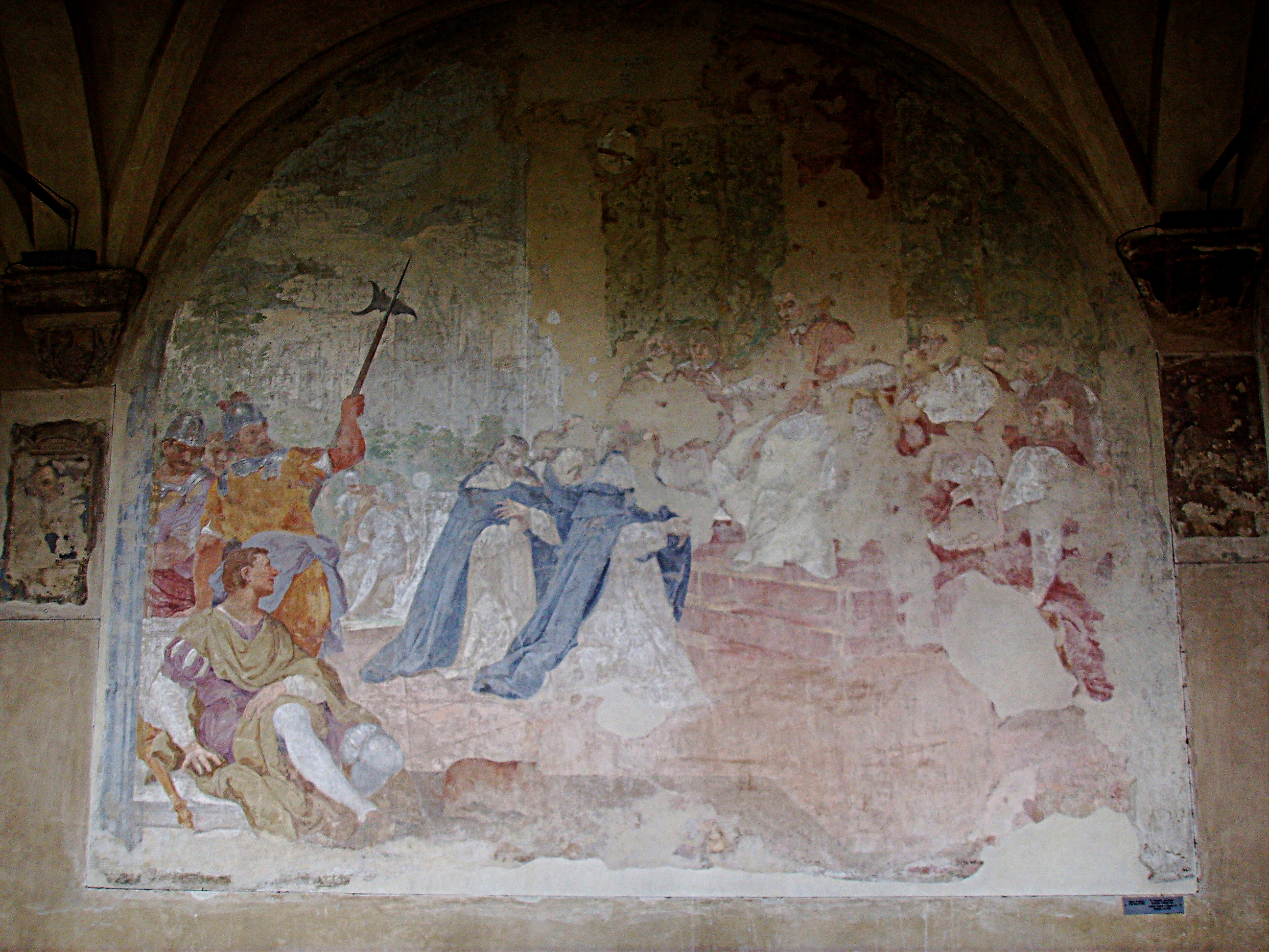 Mauro Soderini, San Tommaso d'Aquino presenta l'uffizio del Corpus Domini a Urbano IV. Fresco. Chiostro Grande in Santa Maria Novella church in Florence, Italy.